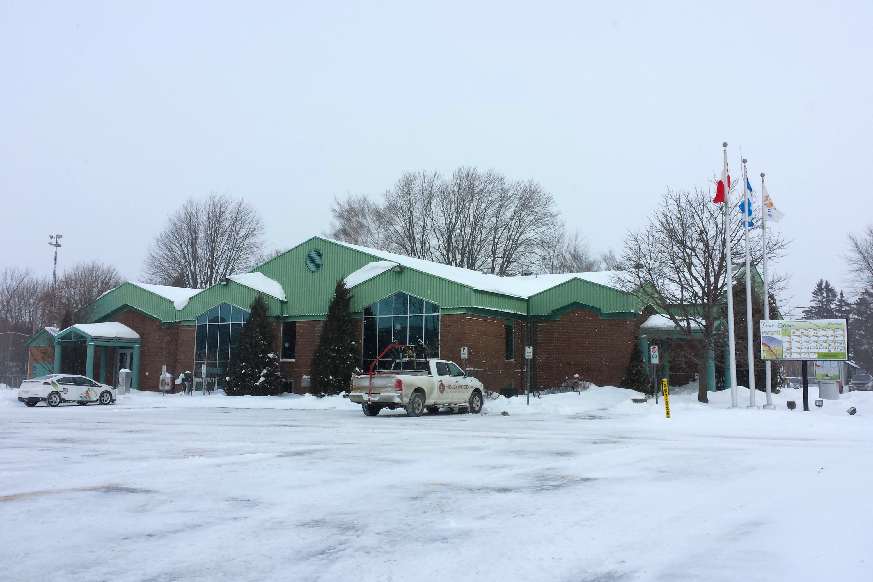 St-Zotique, Quebec, Canada